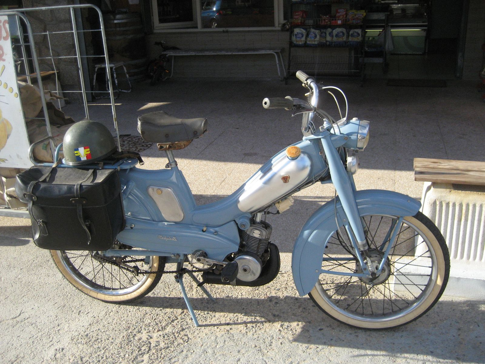 " Toute une époque dans ses 3 lettres " La mobylette le plus célèbre cyclomoteur bleu clair des années 1960 -- 80 fut créé et produit à 14 millions d'exemplaires par l'entreprise française Motobécane . Après sa faillite en 1983 elle devint MBK , puis une filiale de Yamaha . Les premiers modèles furent produit en 1949 . Photo prise à Porto Pollo . .